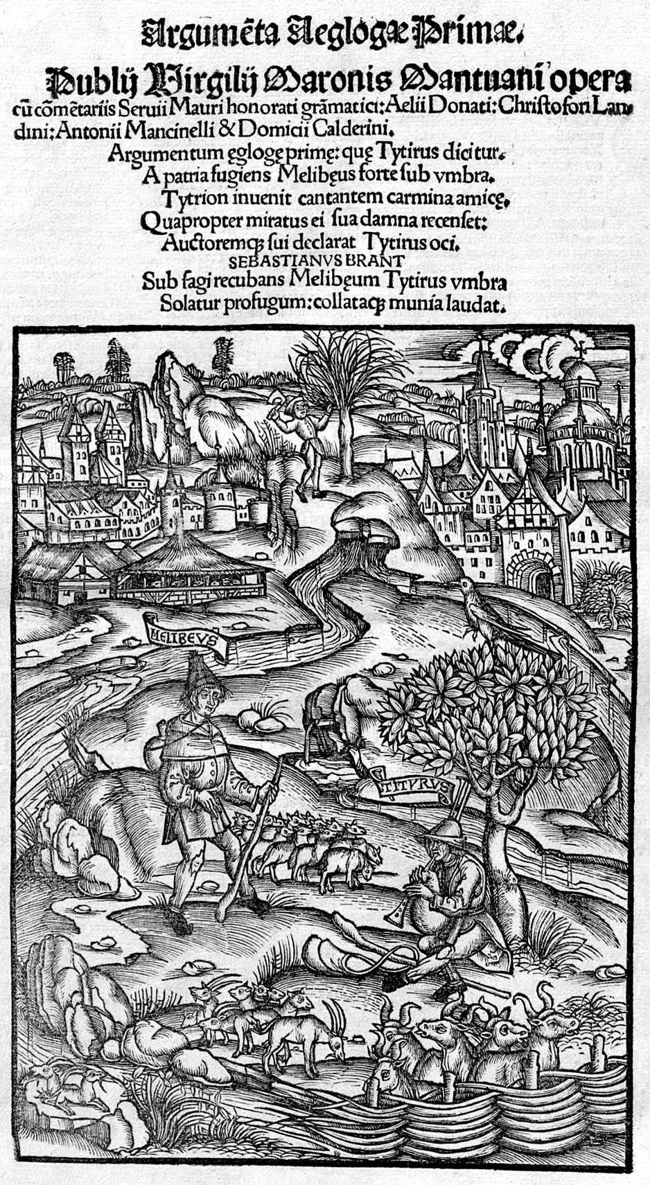 Abbildung zur 1. Ecloge der Hirtengedichte des Vergil